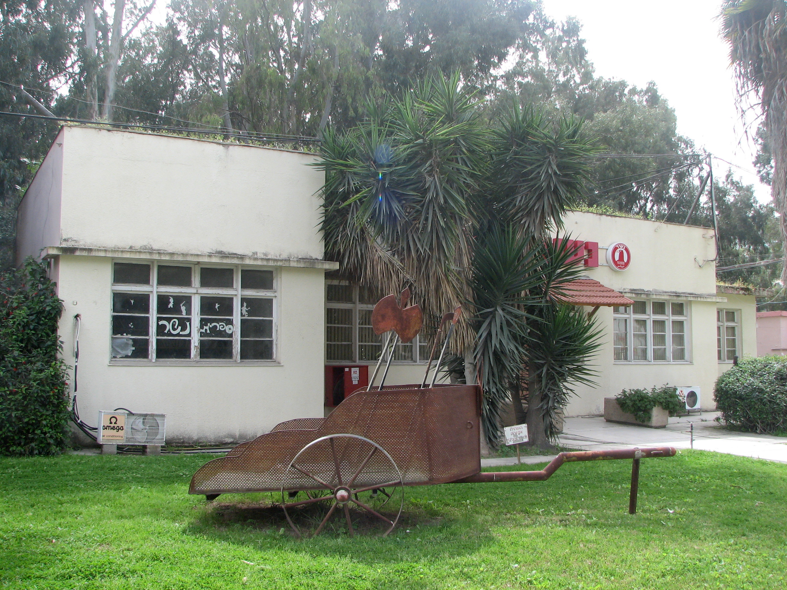 Nesher Nesher Israel Cement Enterprises in the city Nesher Israel. The factory was astablished in 1925 בית החרושת למלט בנשר- היום שמו נשר מפעלי מלט ישראליים נרשם ב- 1922 . בשנים לאחר מיכן הוקם באזור נשר . הכבשן הראשון הופעל באוקטובר 1925 המרפאה ששימשה את עובדי בית החרושת נשר ואת תושבי השכונה נשר שגרו ליד בית החרושת הרופא גר במבנים ליד בית החרושת